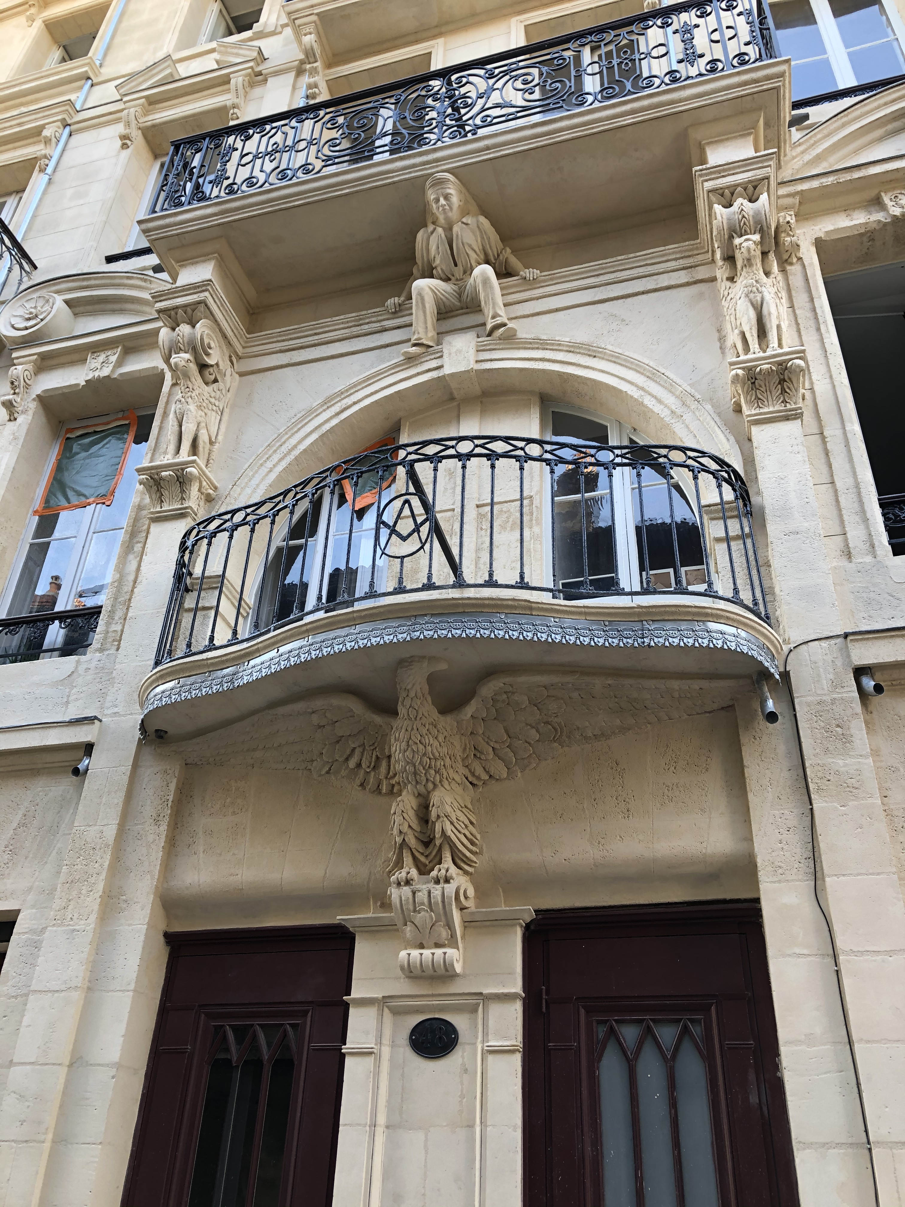 Hôtel Saint-François à Bordeaux, après restauration (façade nord)